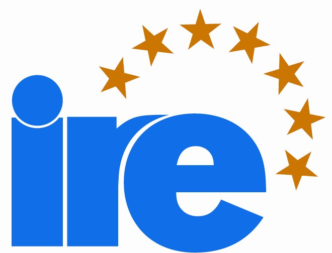 Logo des Instituts der Regionen Europas